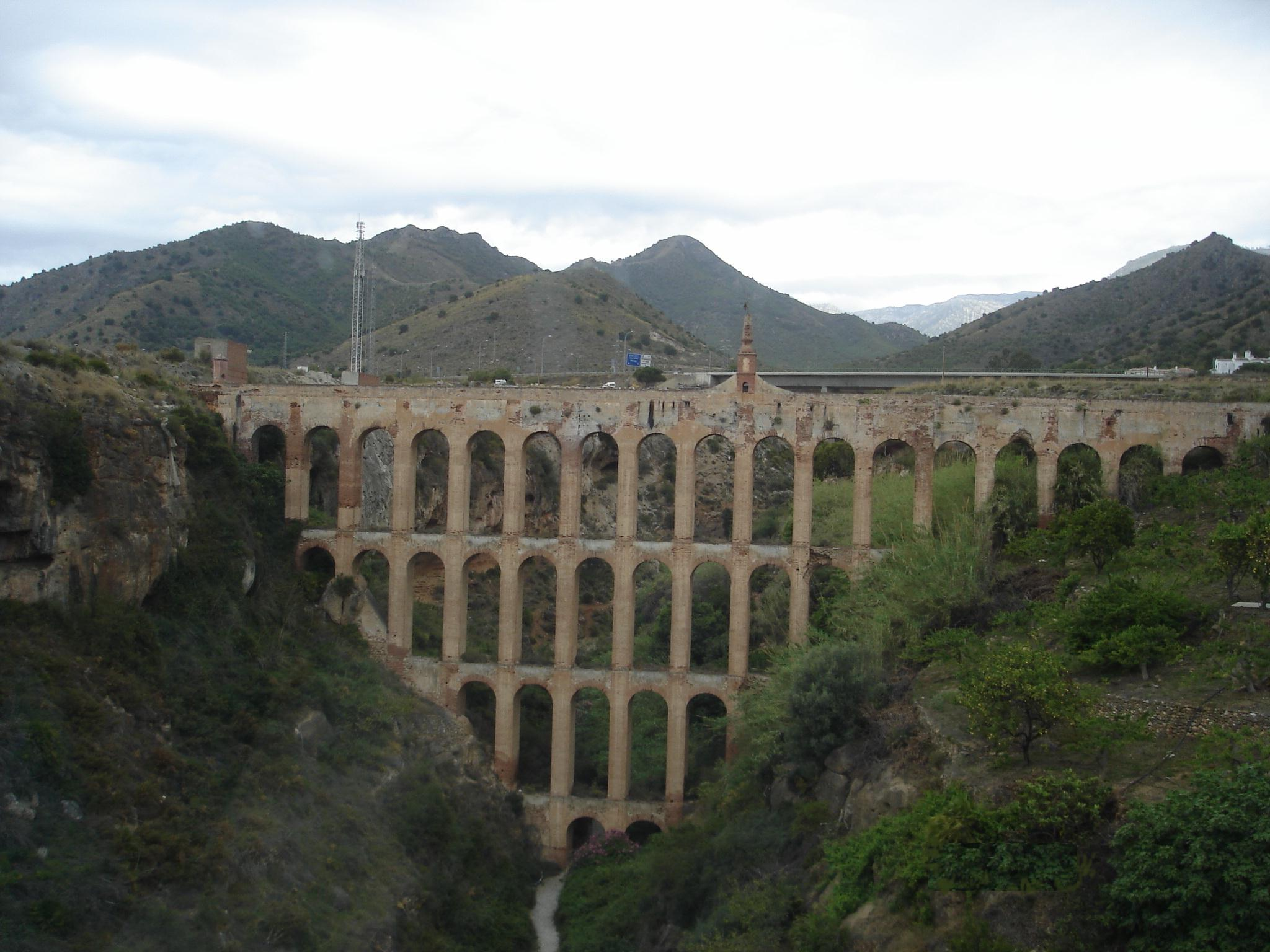 Aqueduc d'alimentation en eau aux alentours de la ville de Nerja (Andalousie)- Espagne Auteur : Jean-Claude Perez